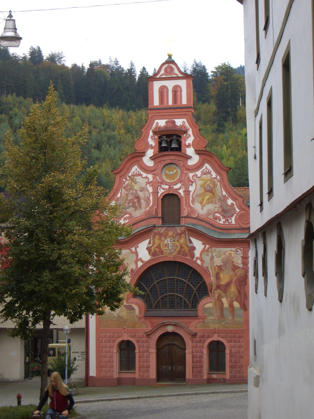 Die Spitalkirche Heilig Geist in Füssen